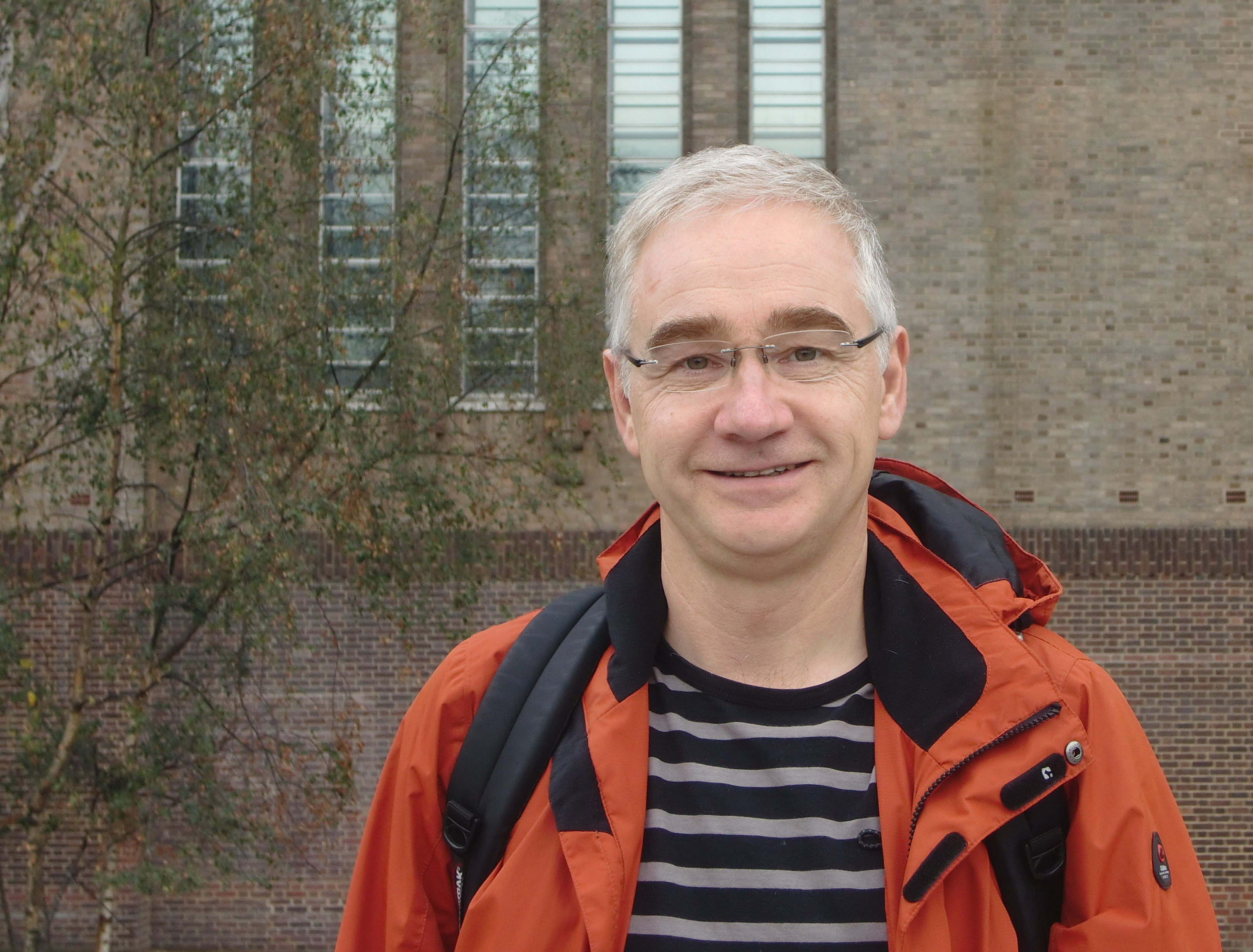 Michael Bienert (*1964), Autor und Journalist. London 2013.